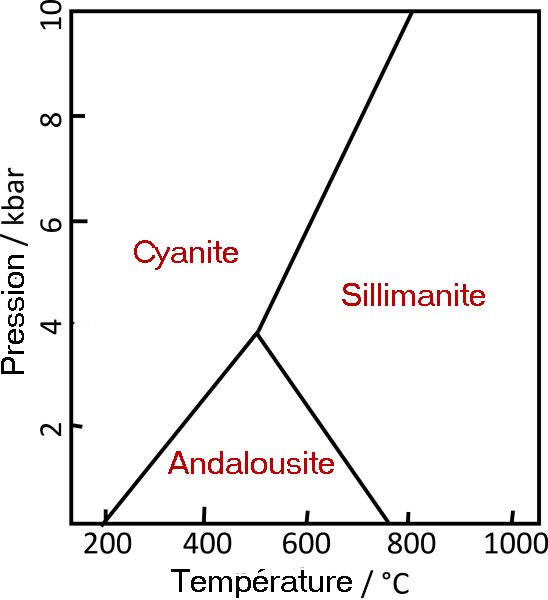 Diagramme de phases des silicates d'aluminium de formule générale Al2SiO5 (groupe sillimanitique qui comprend trois polymorphes : sillimanite, cyanite et andalousite).